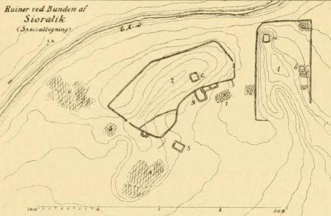 Plan au sol et situation , des vestiges de la ferme de Sioralik, à Vatnahverfi.